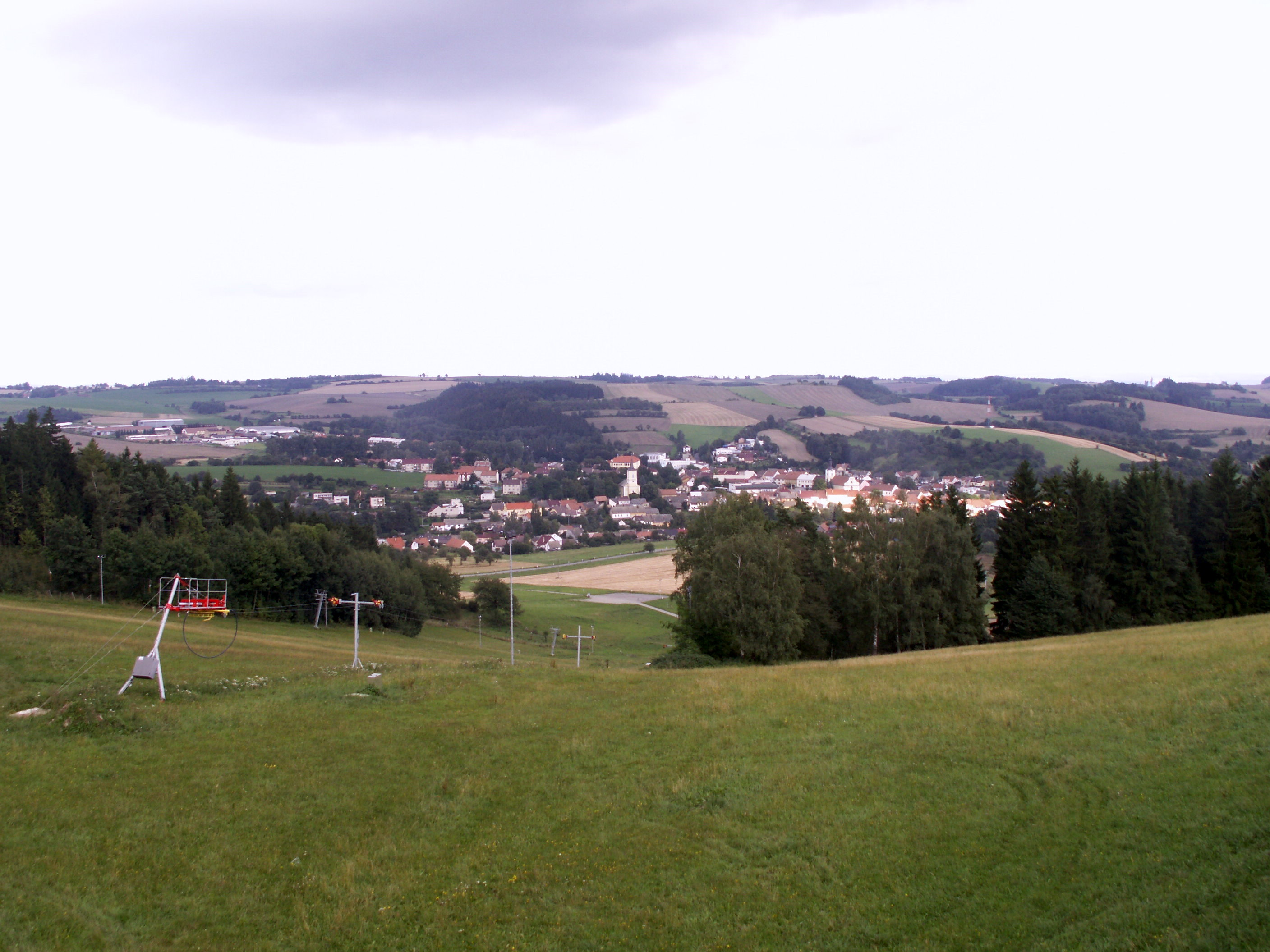 Pohled z rozhledny na vrchu Kopaniny na město Olešnice (okres Blansko)